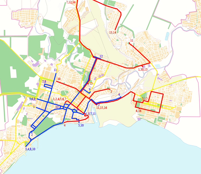 Mariupol transport map map